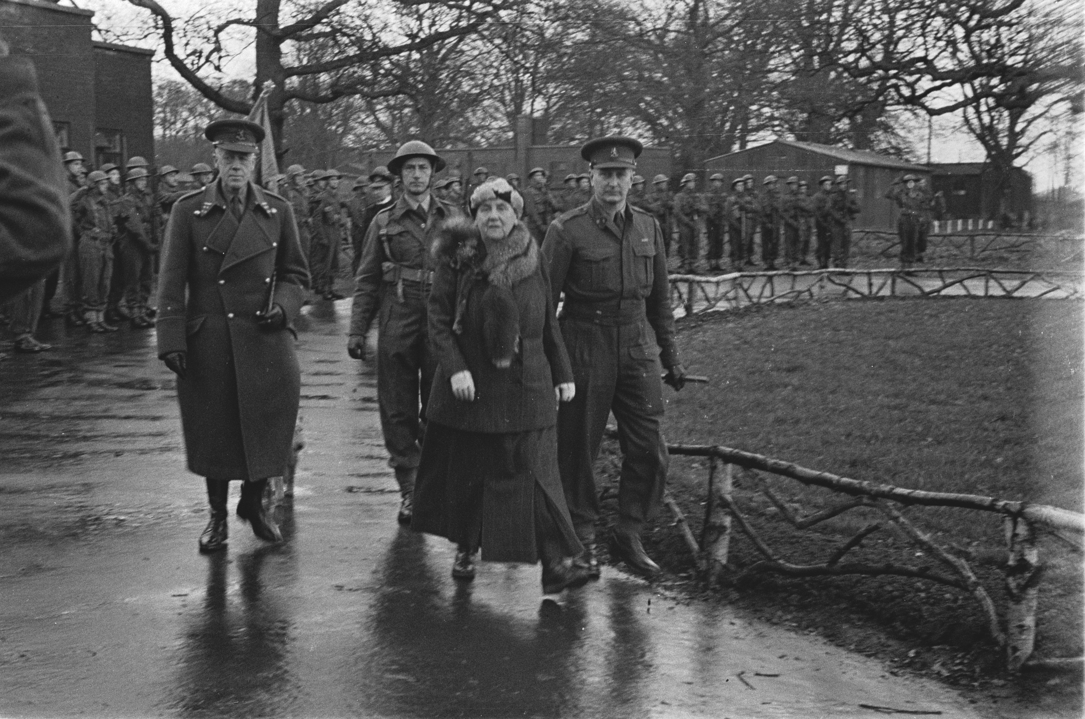 Collectie / Archief : Fotocollectie Anefo Reportage / Serie : [ onbekend ] Beschrijving : Koningin Wilhelmina op bezoek bij de Prinses Irene Brigade in het militaire kamp te Wolverhampton {links van haar generaal Phaff en rechts brigadecommandant De Ruyter van Steveninck] Datum : 1942 Locatie : Groot-Brittannië Trefwoorden : bezoeken, kampen, leger, officieren, soldaten, tweede wereldoorlog Persoonsnaam : Wilhelmina, koningin Fotograaf : Onbekend / Publiek Domein, [onbekend] Auteursrechthebbende : Nationaal Archief Materiaalsoort : Negatief (zwart/wit) Nummer archiefinventaris : bekijk toegang 2.24.01.05 Bestanddeelnummer : 934-9560